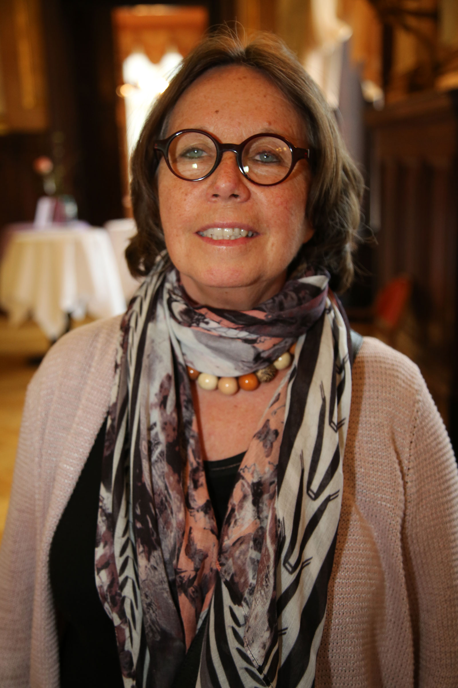 Univ.-Prof. DR. Renee Schröder, Biochemikerin